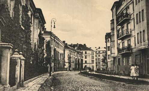 Warszawa, Stara Ochota, ul. Mochnackiego w latach 30.